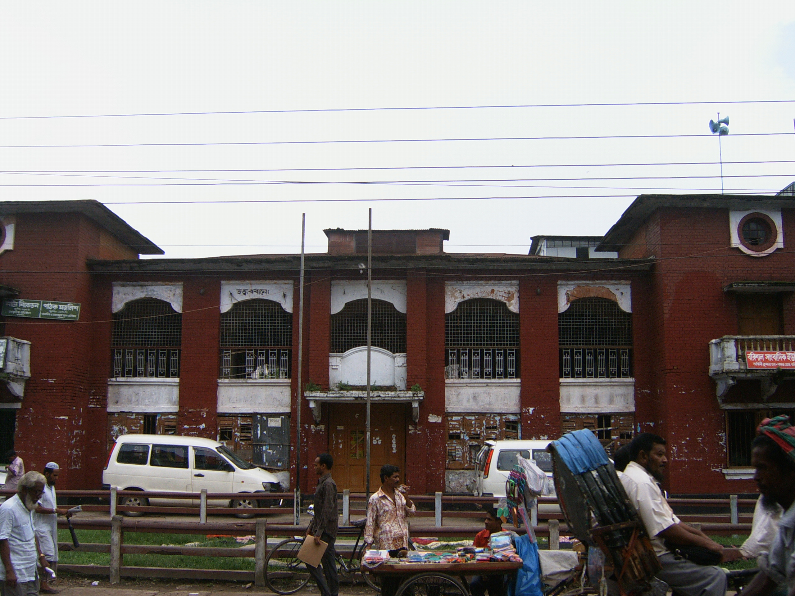 Barisal Town Hall, Barisal, Bangladesh